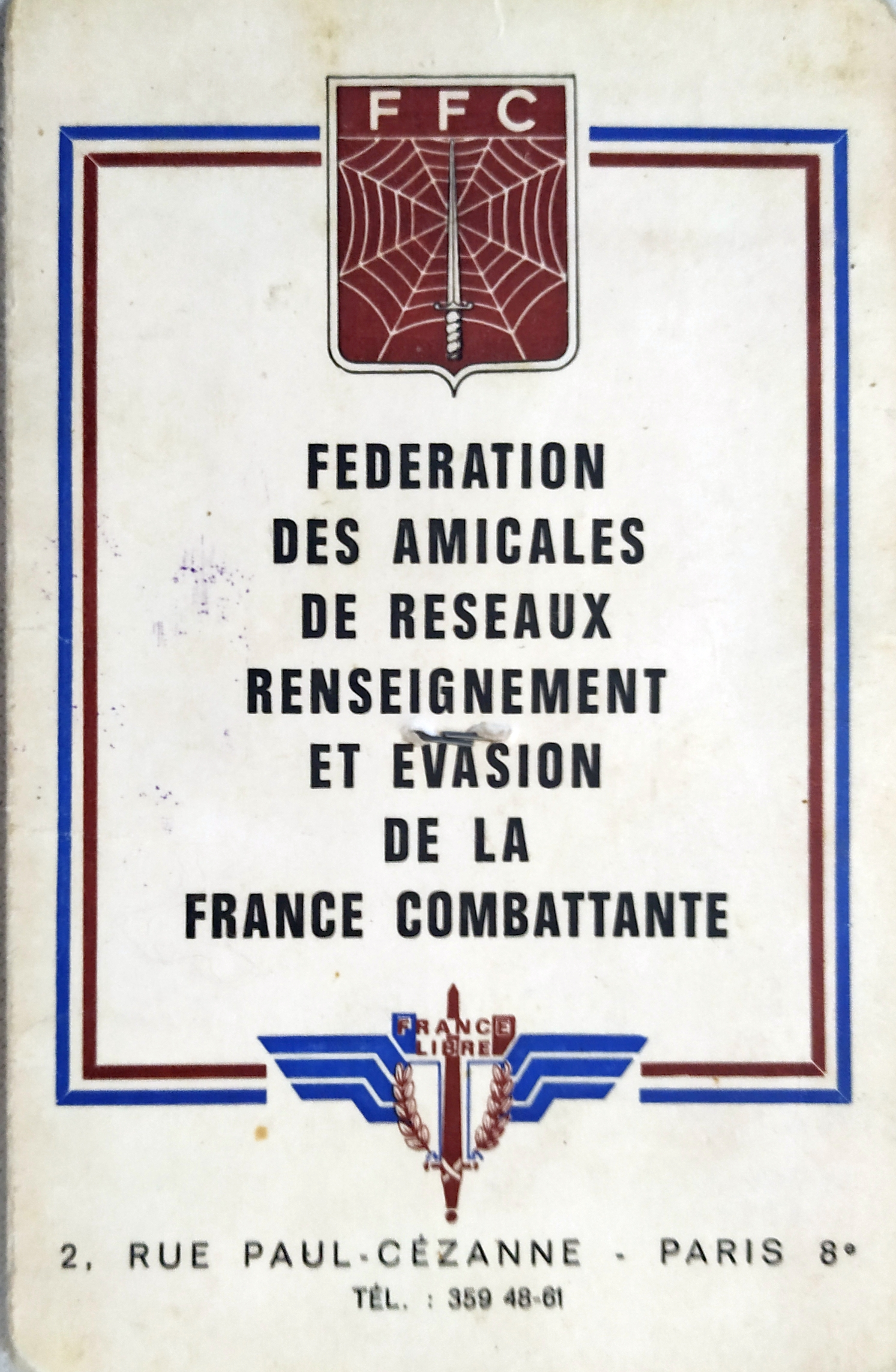 Couverture de la carte d'adhérent de la FARREFC de Marcelle Potier "Arnaud"